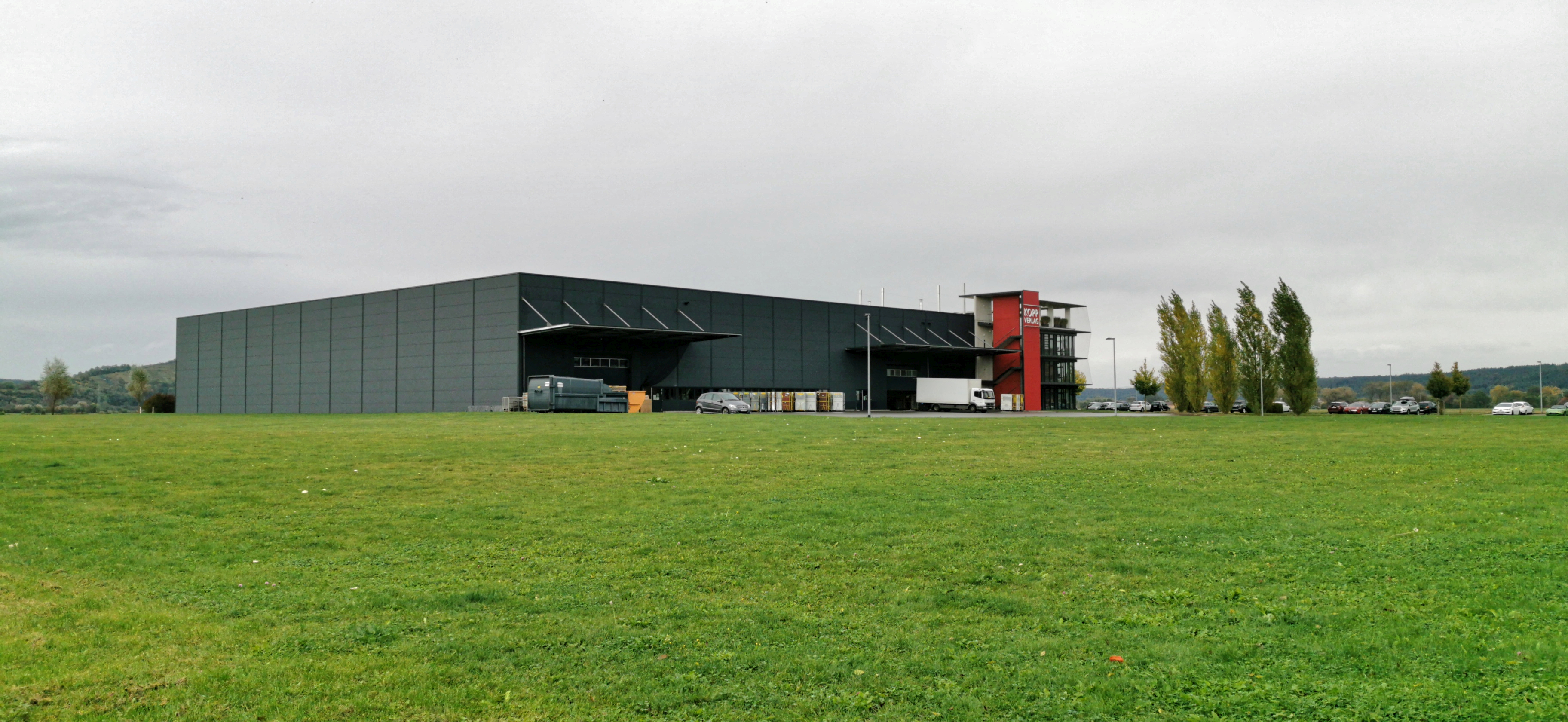 Rottenburg am Neckar 2019